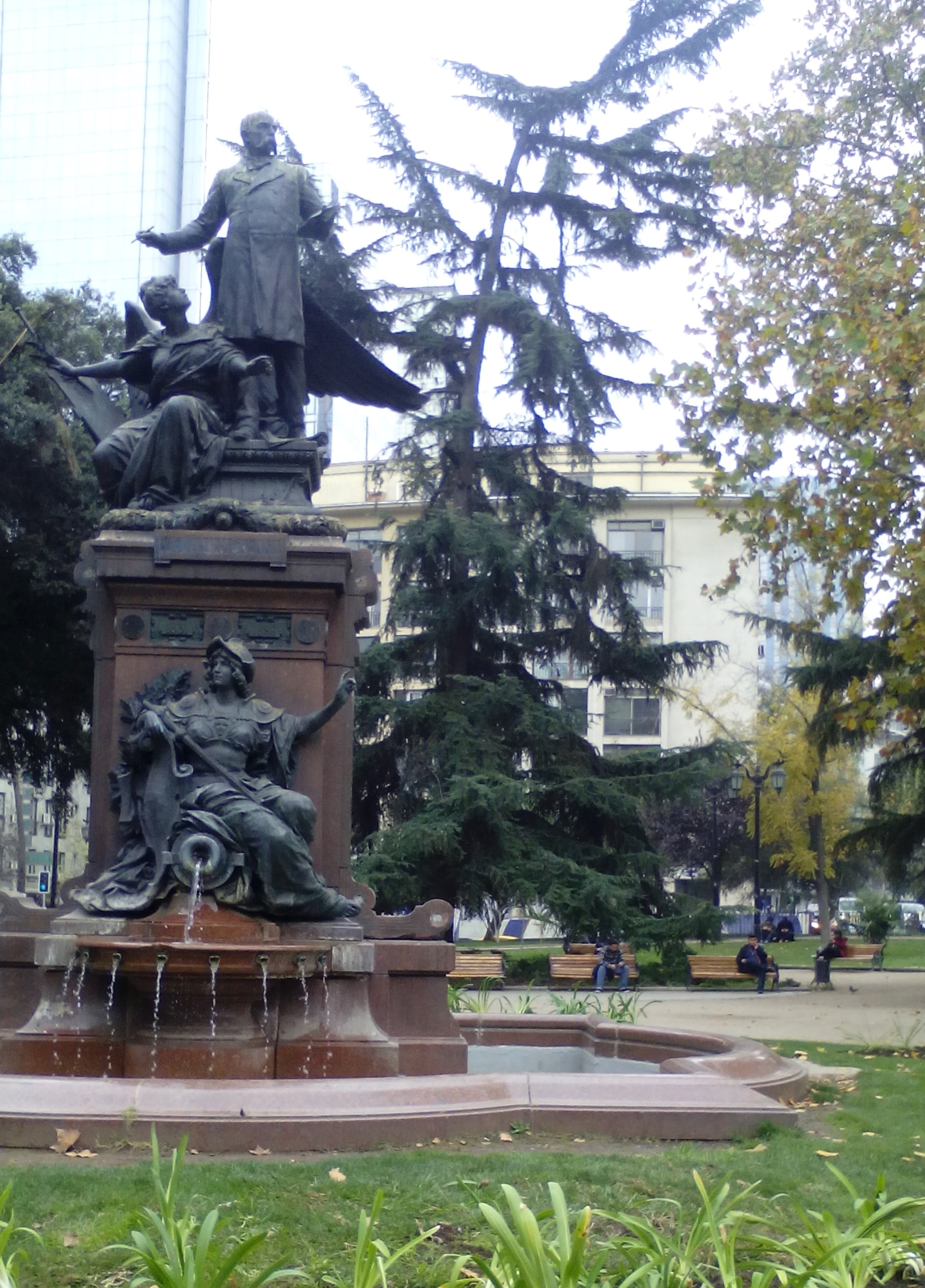 Vista frontal desde la Plaza Vicuña Mackenna del ex Castillo Dávila